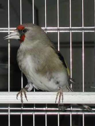 Carduelis carduelis, caniceps group female